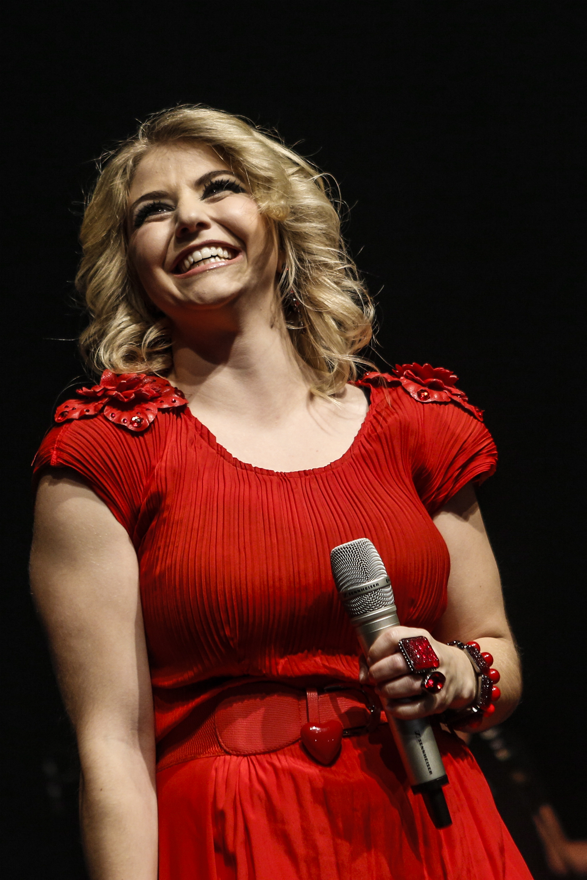 Die Schweizer Schlagersängerin Beatrice Egli am 19. Oktober 2013 im "Capitol" in Offenbach.